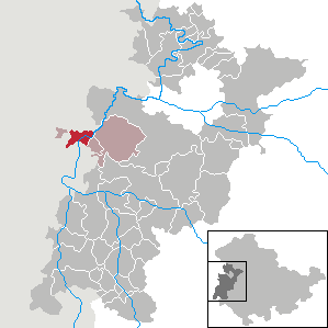 Dankmarshausen in Thuringia - Wartburgkreis